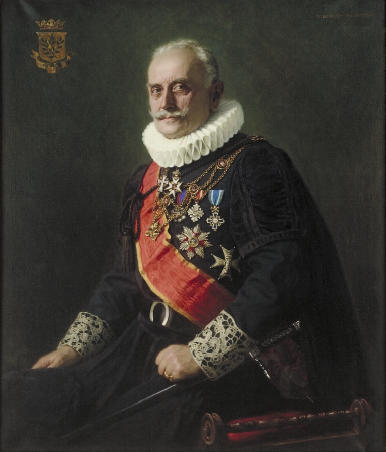 Markis Claes Lagergren (1853–1930)